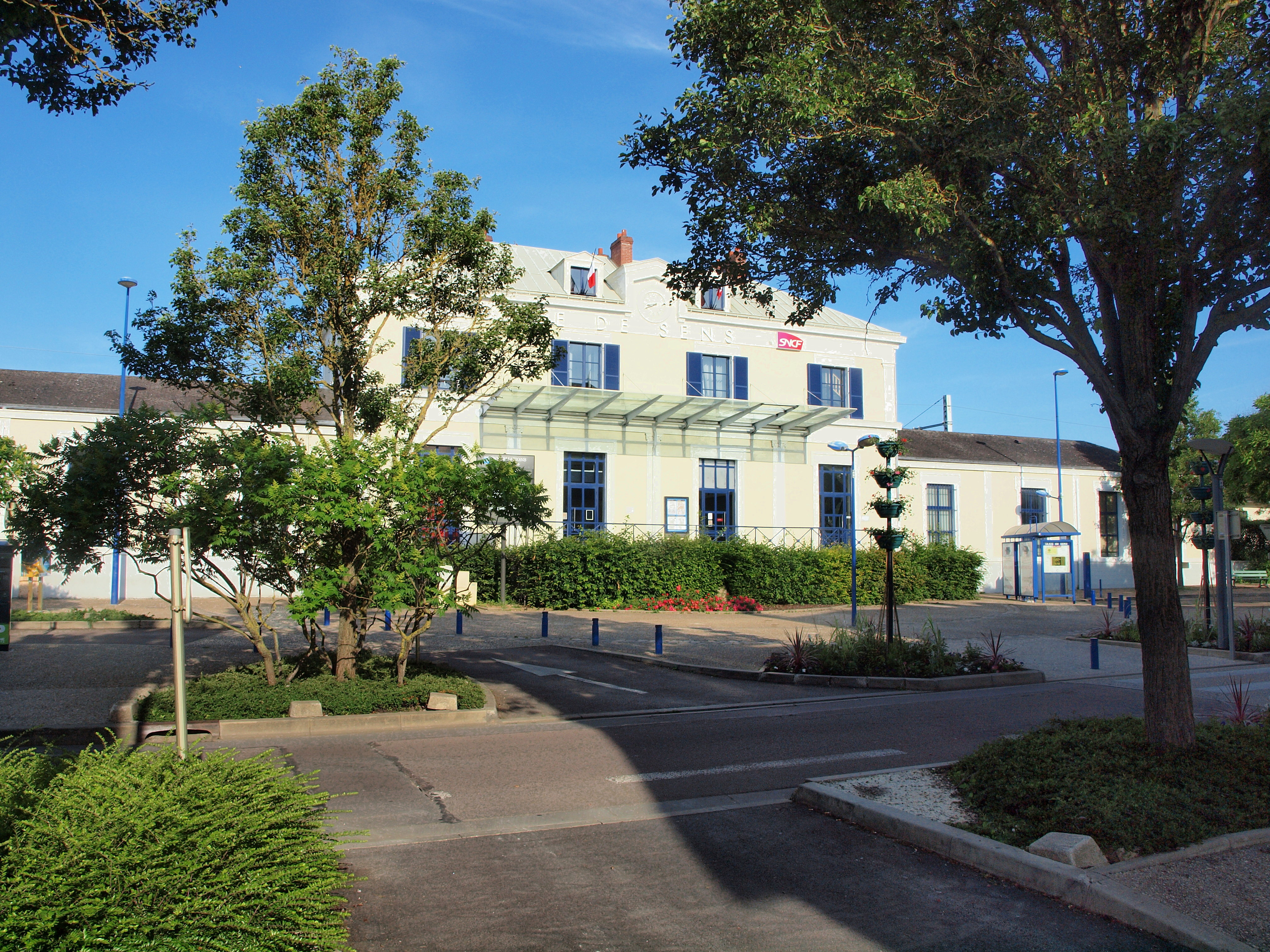 Gare de Sens (Yonne, France)